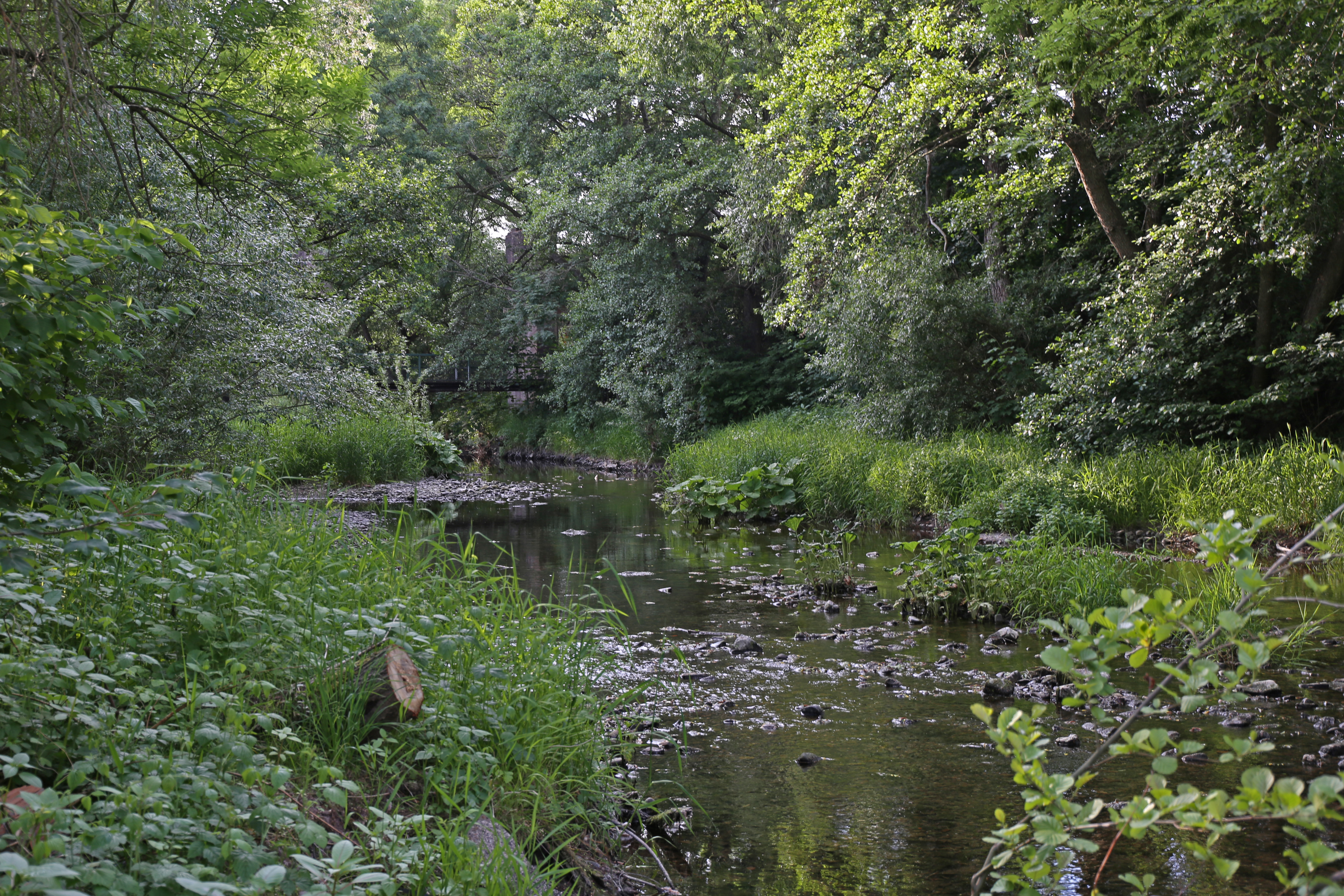 Zorge bei Obersalza (Nordhausen, Thüringen)